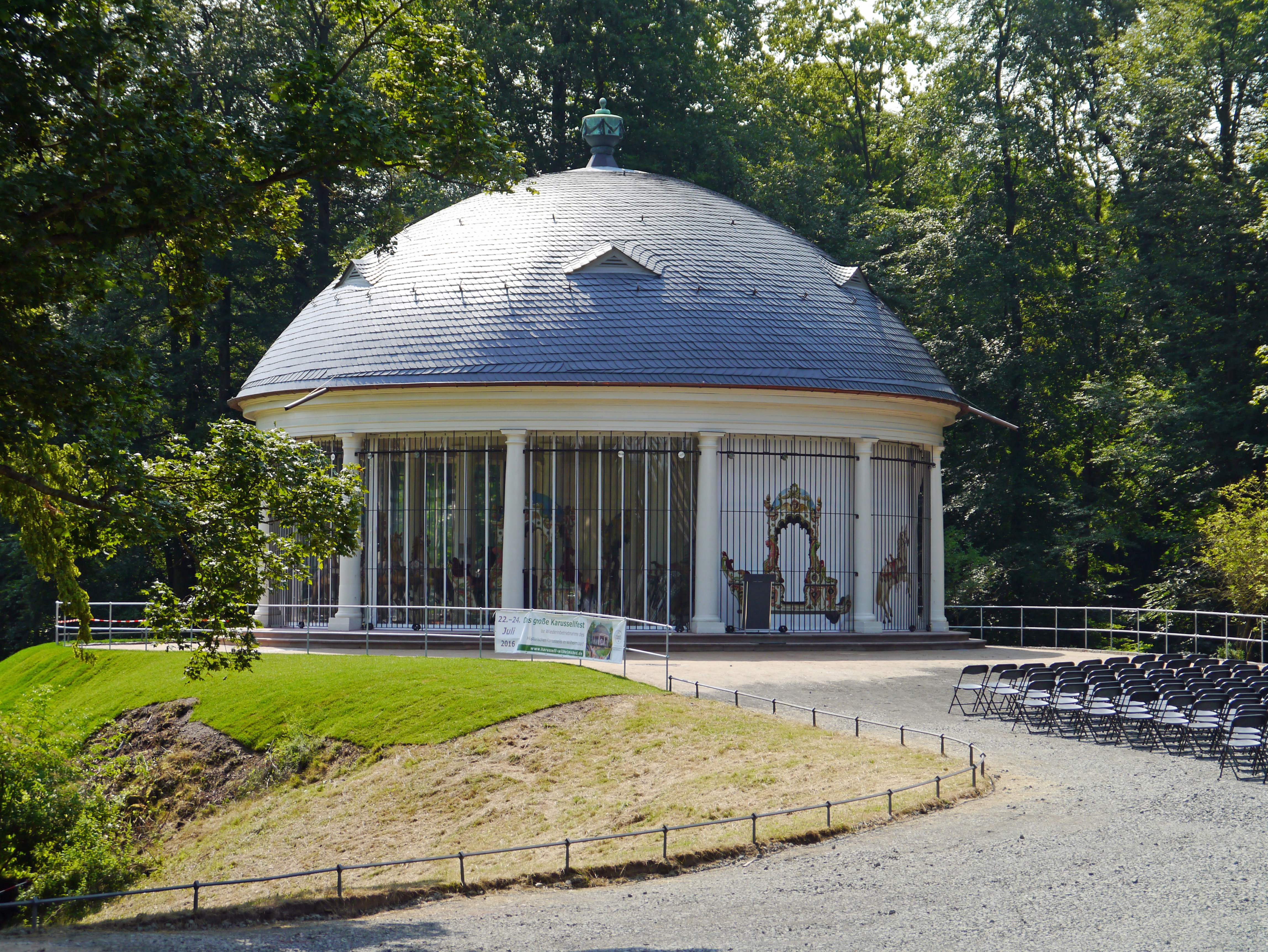 Das historische Karussell im Staatspark Wilhelmsbad, 2016 einen Tag vor seiner Wiedereröffnung nach der Renovierung.